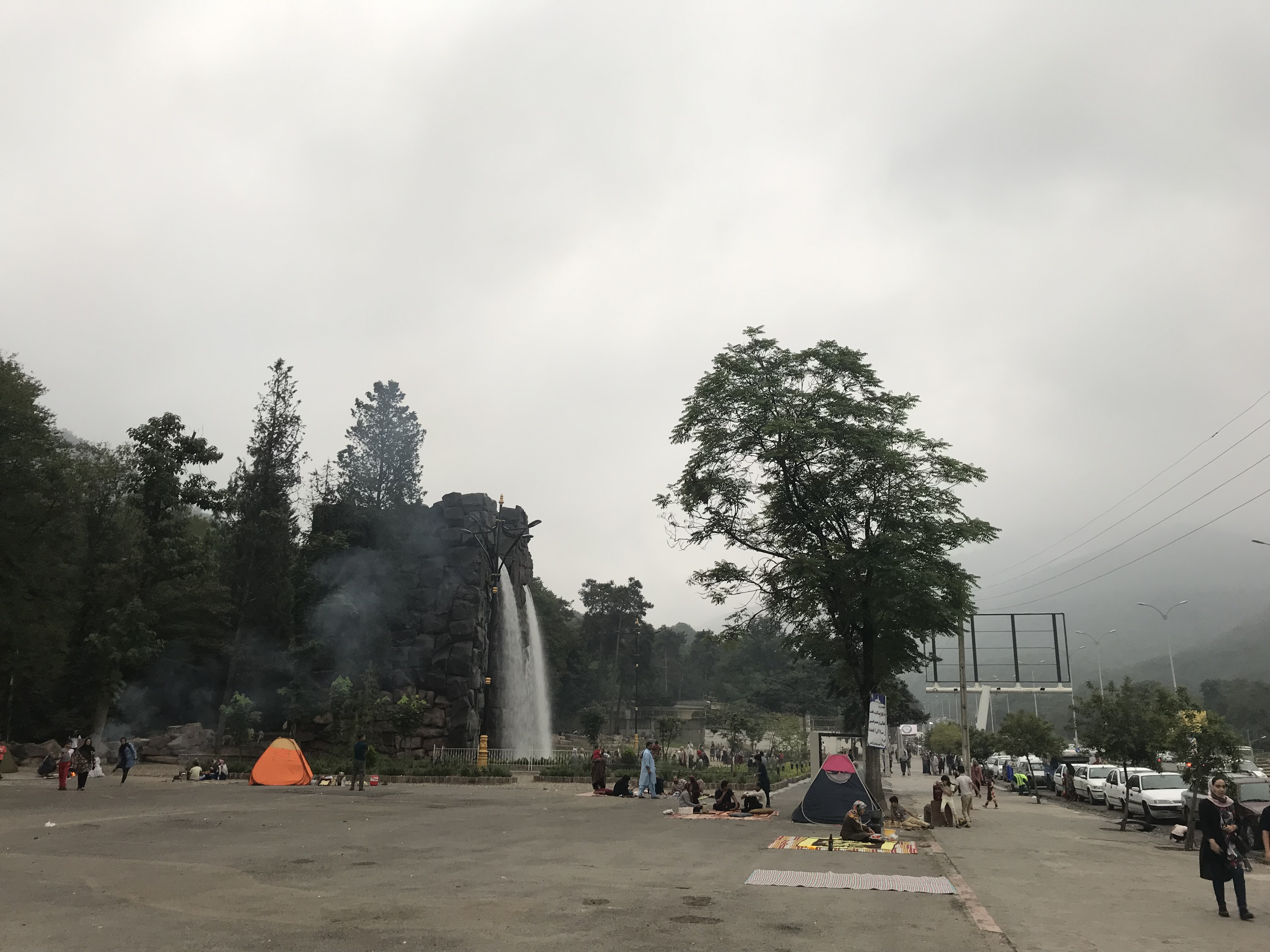 پارک جنگلی ناهارخوران